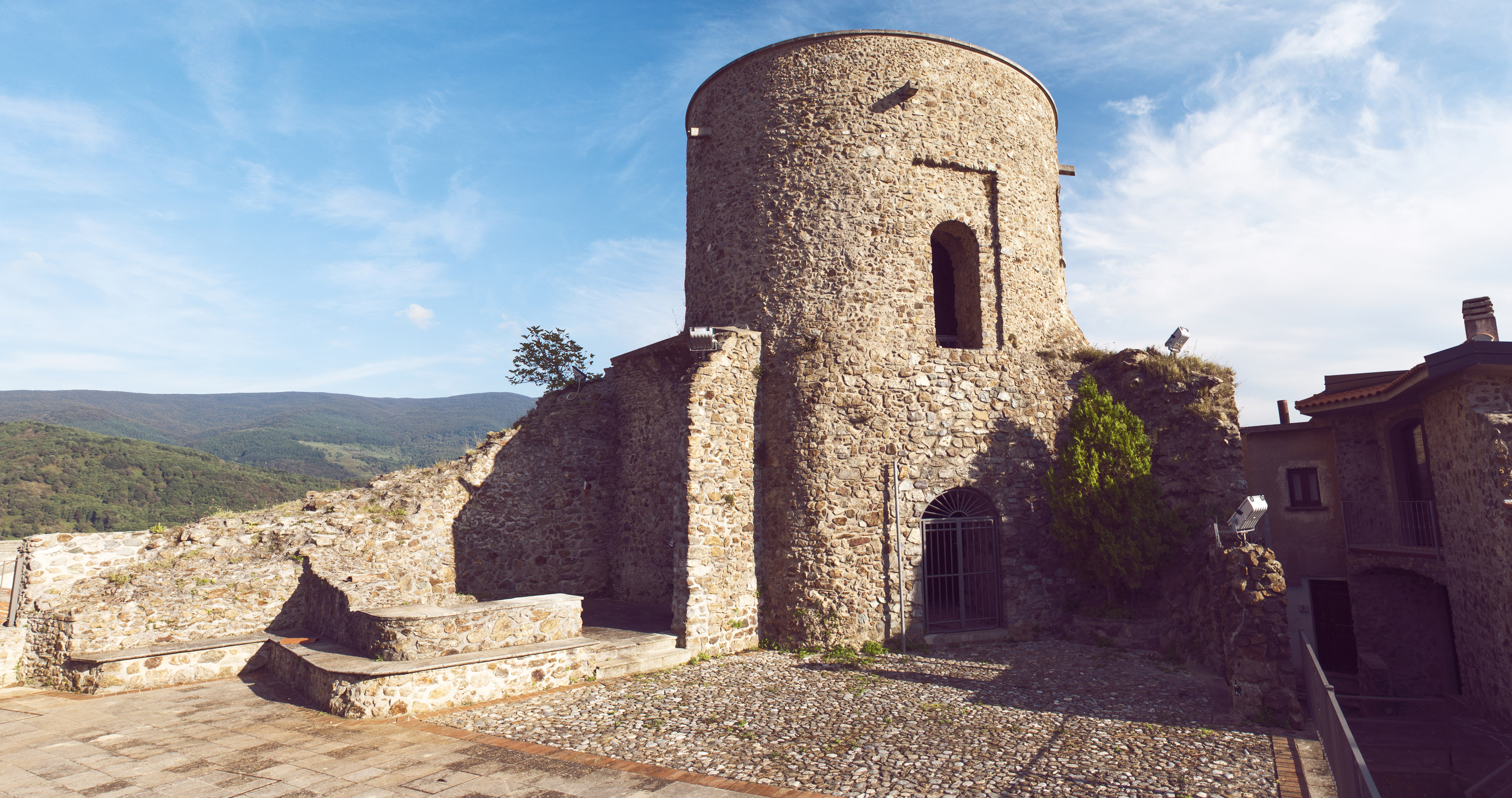 Guardia Piemontese: la torre di guardia (Torre Medioevale) This is a photo of a monument which is part of cultural heritage of Italy.